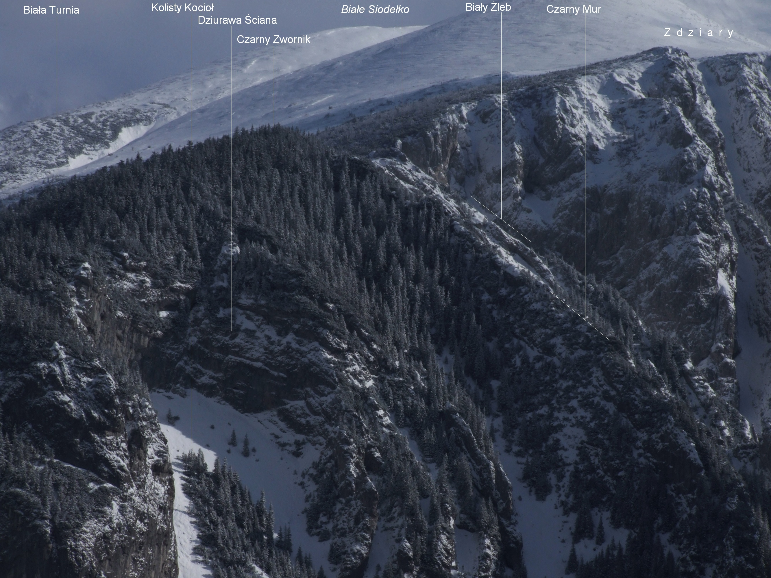 Widok z Polany na Stołach